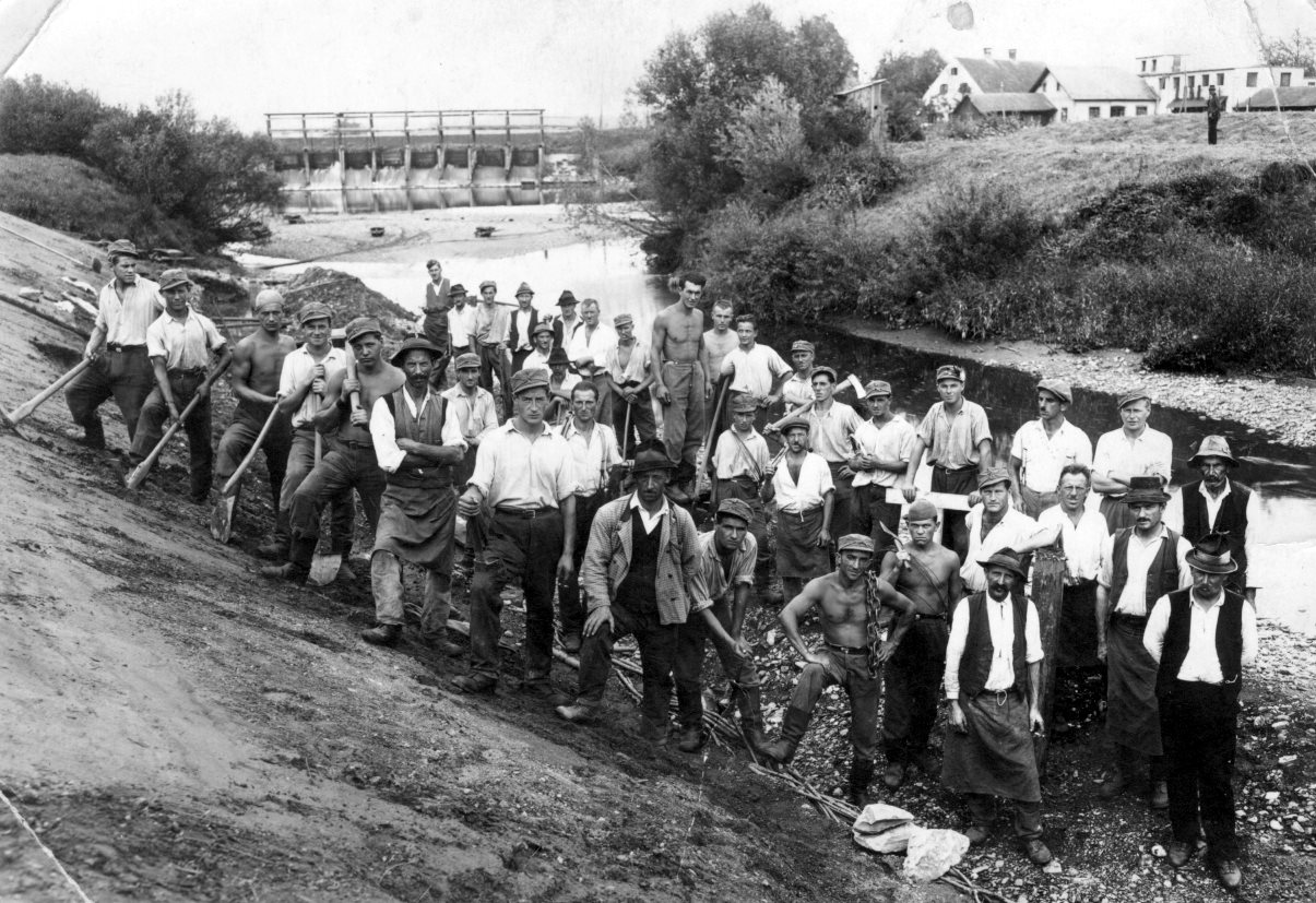 Begradigung des Flusses Kainach in den 1930er Jahren (bei Lieboch)